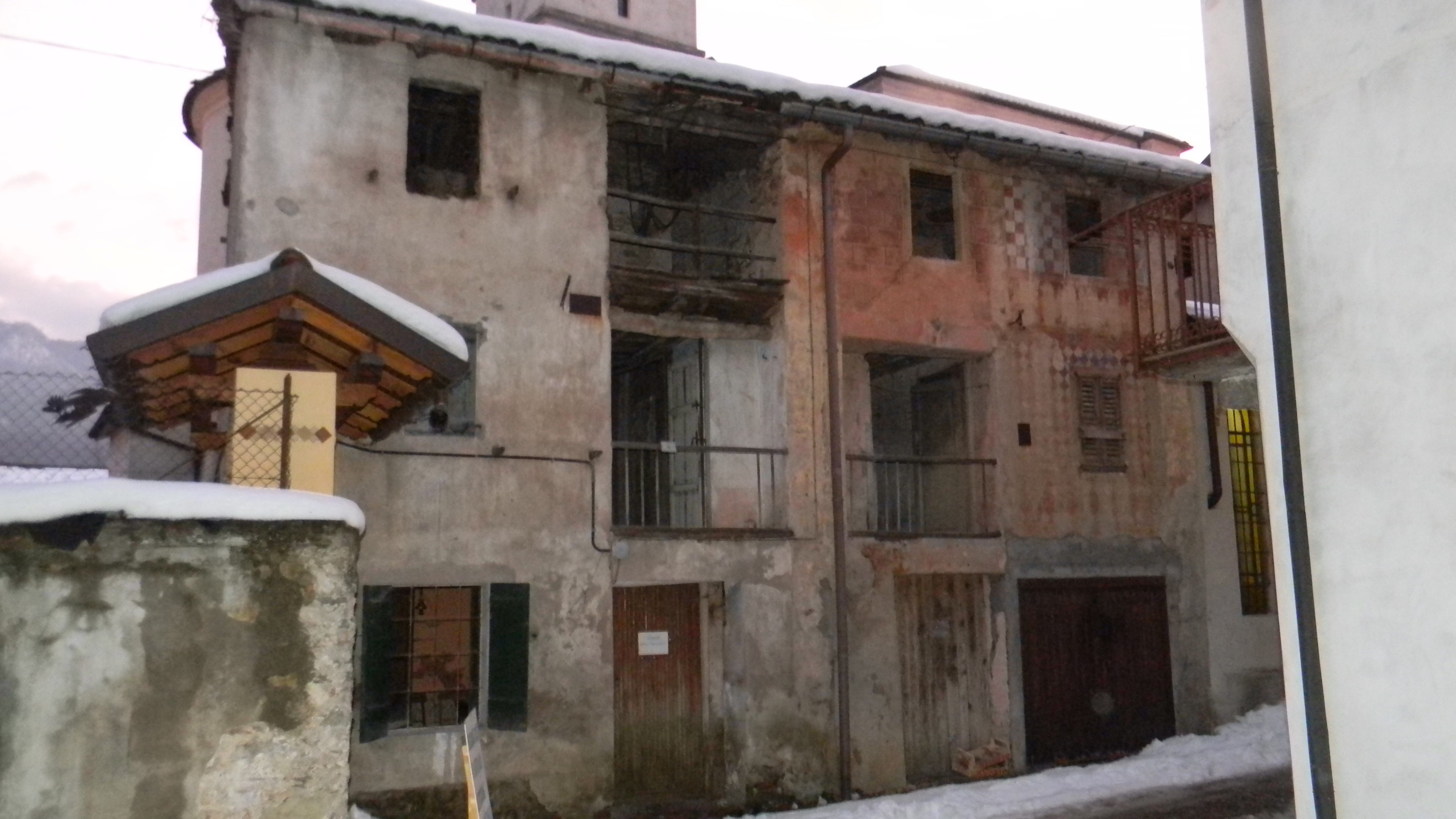 Gli edifici un tempo costituenti il monastero femminile di Brinzio